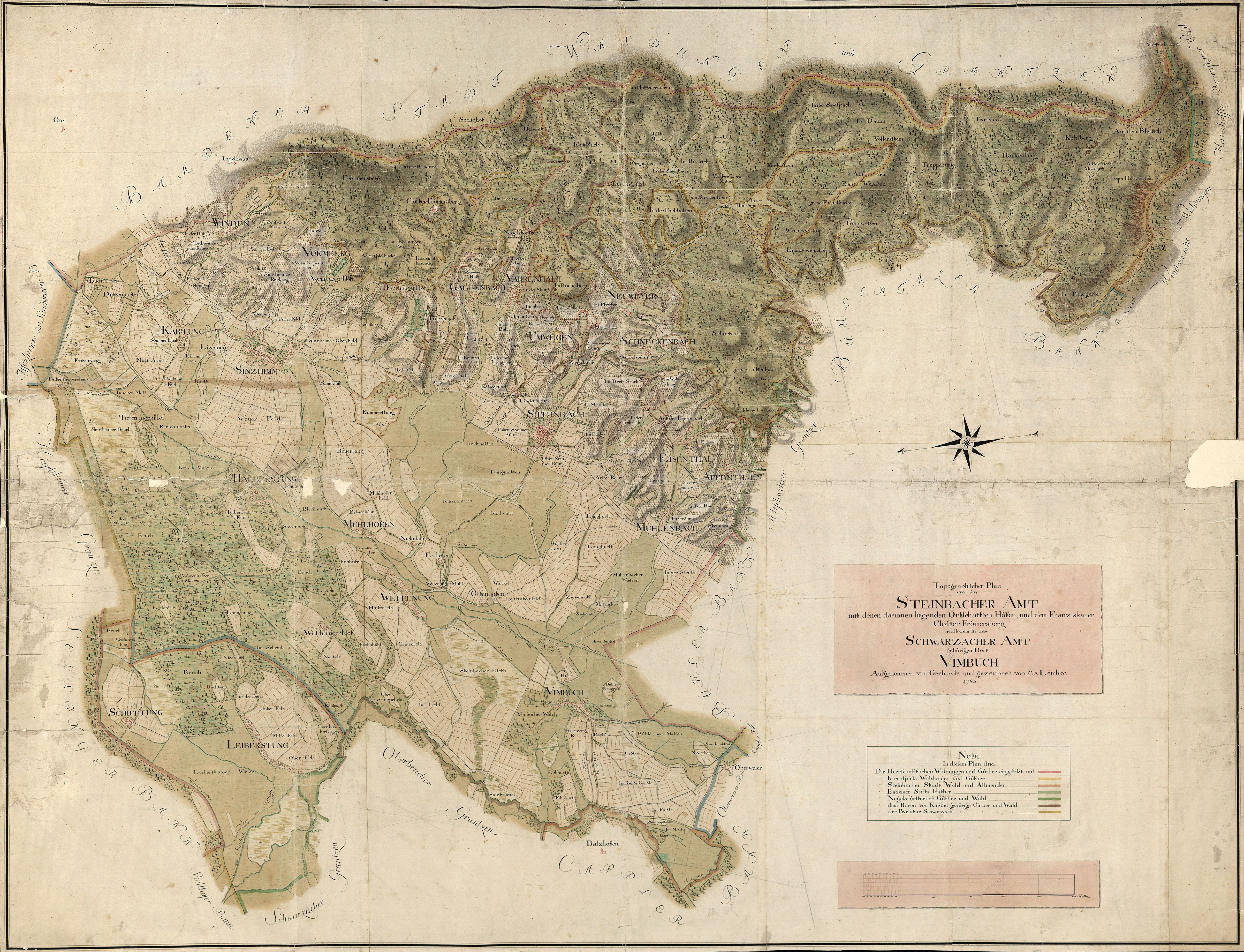 „Topographischer Plan über das Steinbacher Amt mit denen dadrinnen liegenden Ortschafften Höfen und dem Franziskaner Closter Frömersberg nebst dem in das Schwarzacher Amt gehörigen Dorf Vimbuch“.